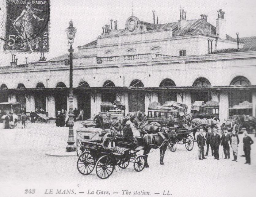 Vue de l'actuelle gare nord du Mans, anciennement façade sur la ville, aux alentours de 1920.